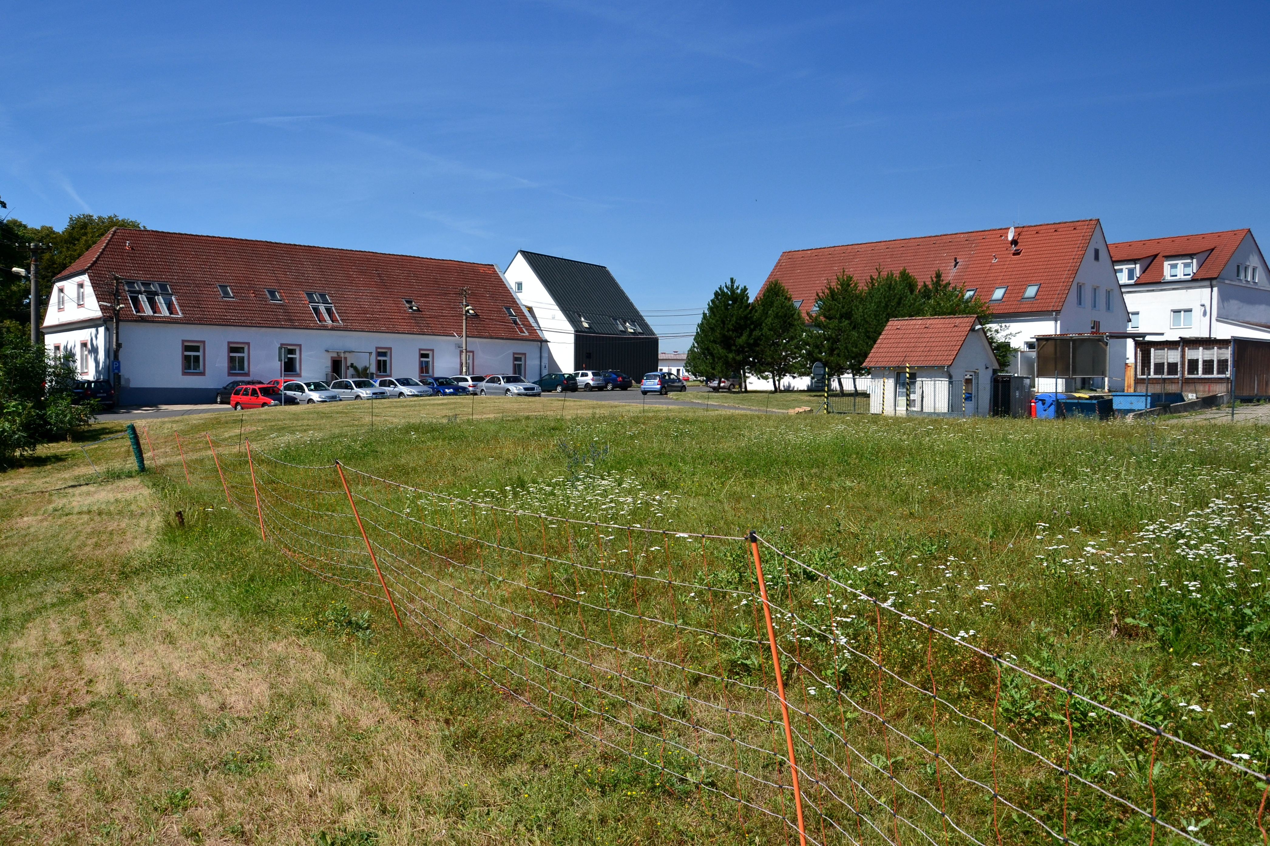 Hliňany čp. 3 a 18